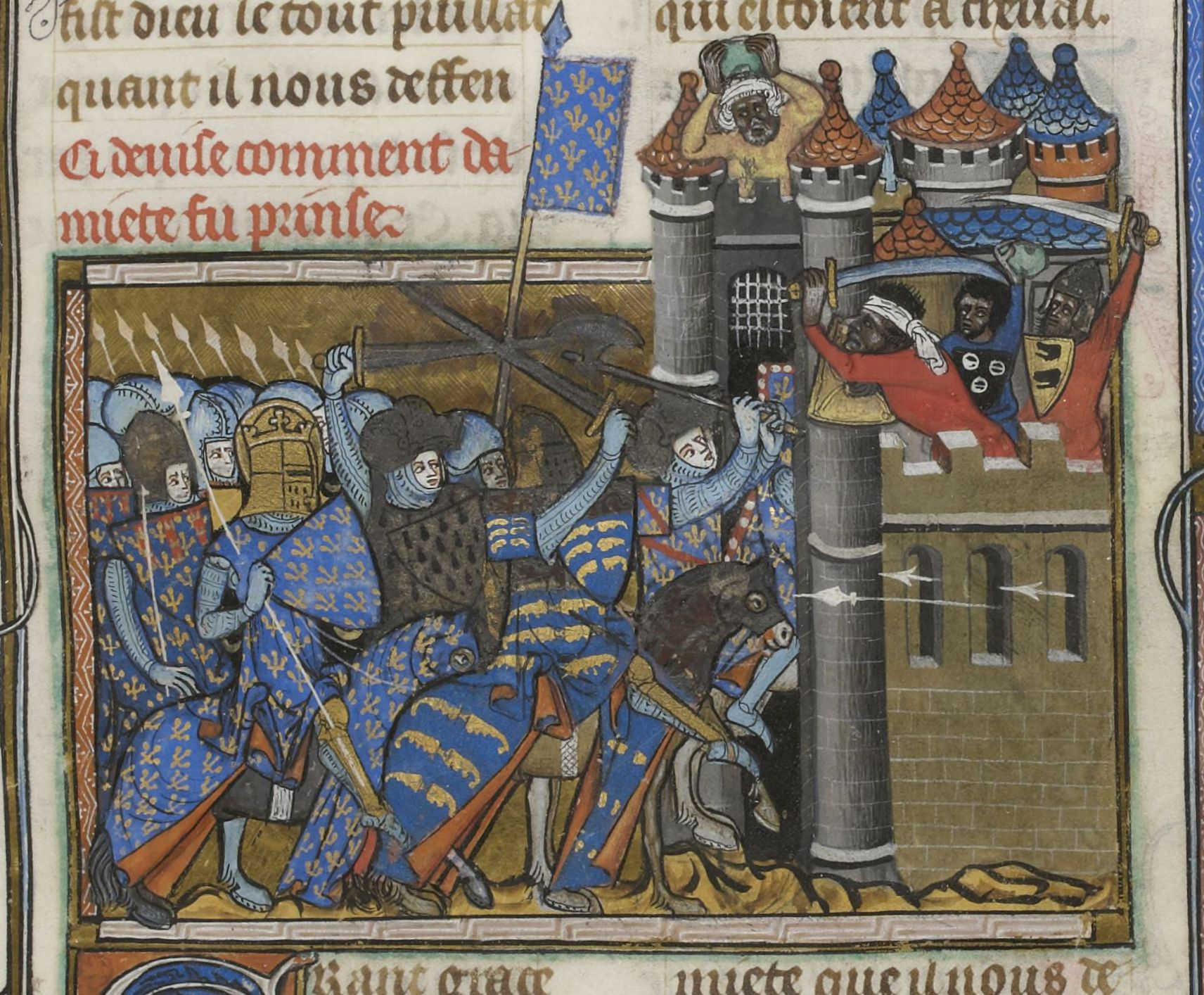 Vie de Saint-Louis par Jean de Joinville: prise de Damiette pendant la Croisade